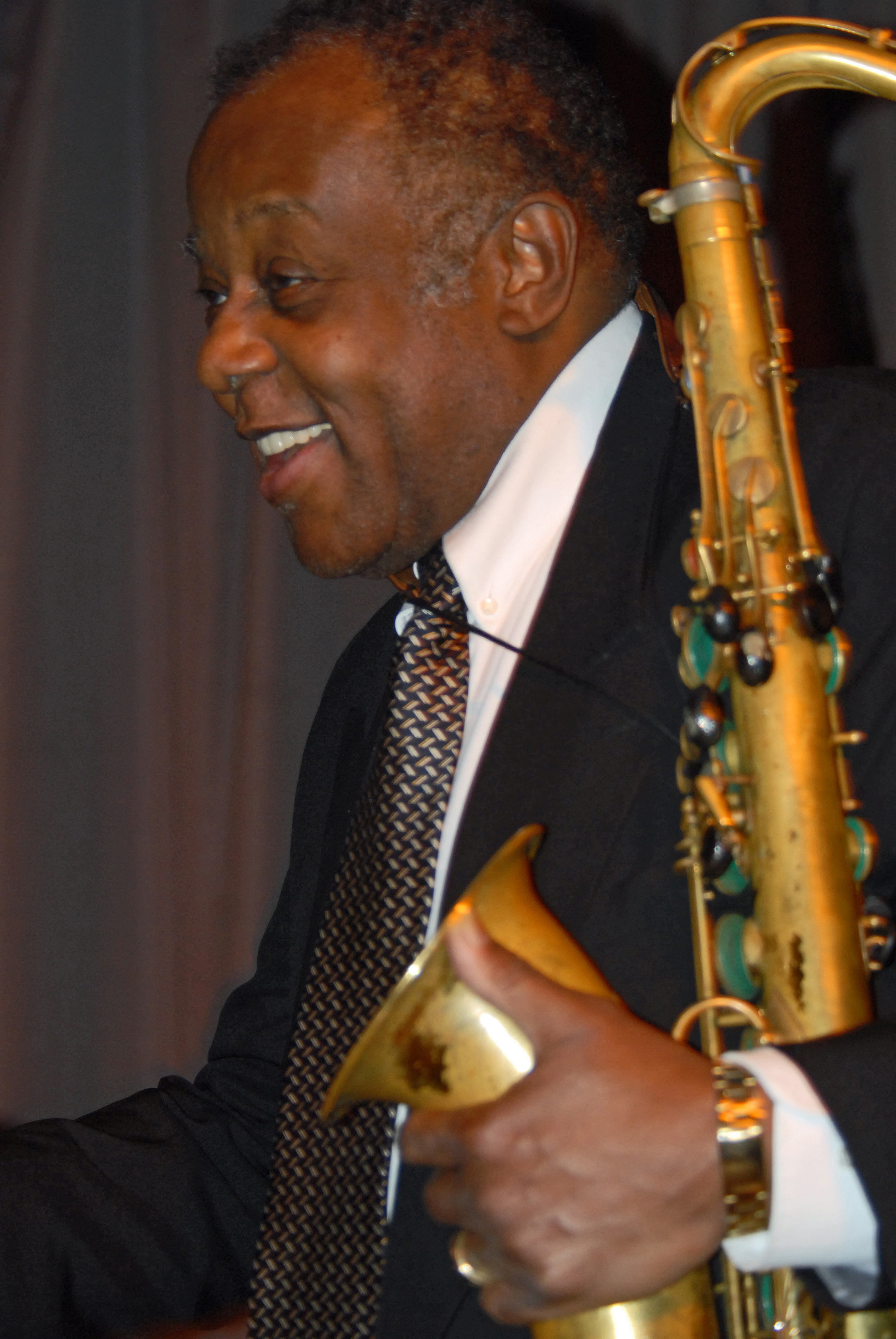 Photo prise par moi même au concert de la MJC Picaud à Cannes